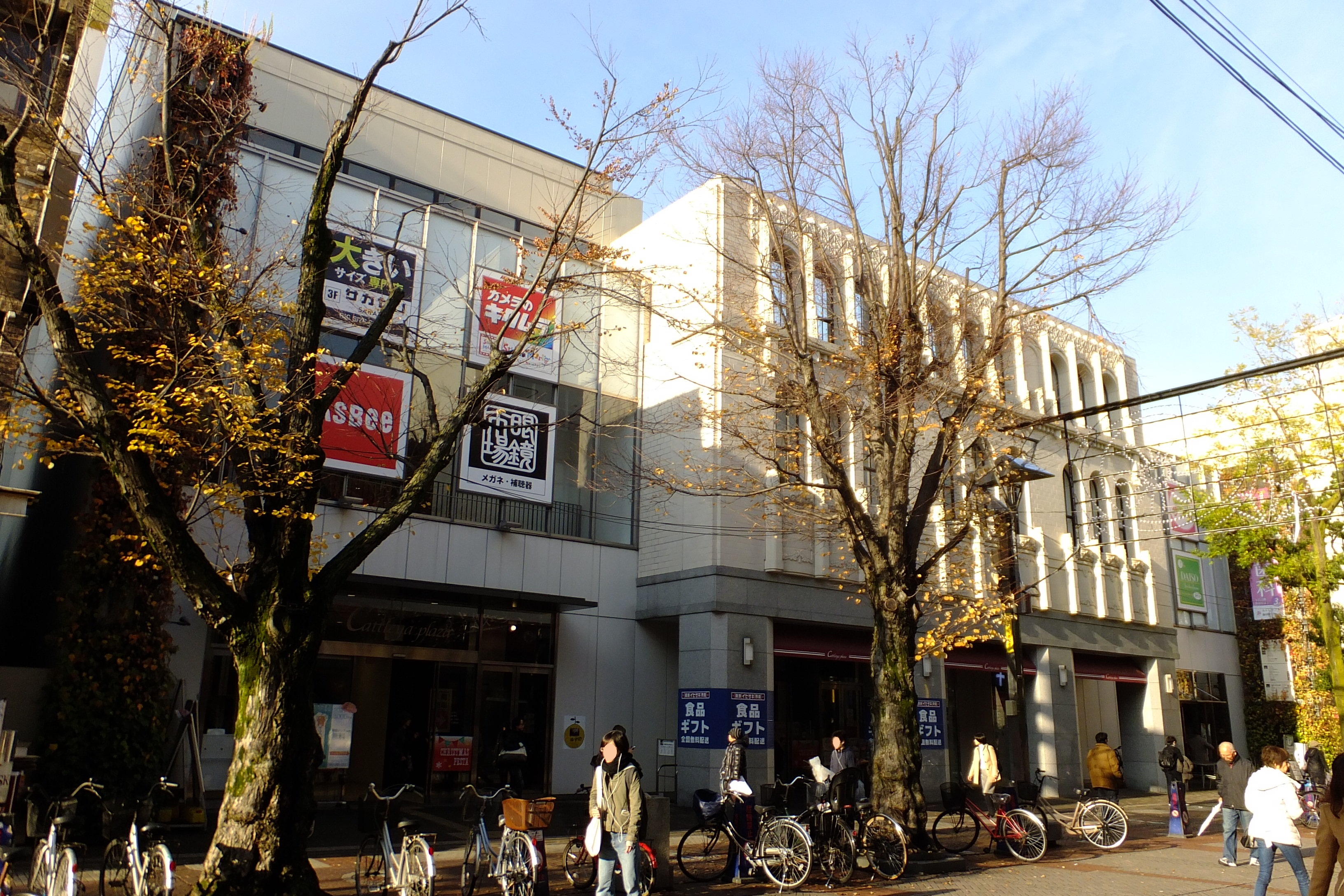 横浜市中区の商業施設、カトレヤプラザ伊勢佐木。